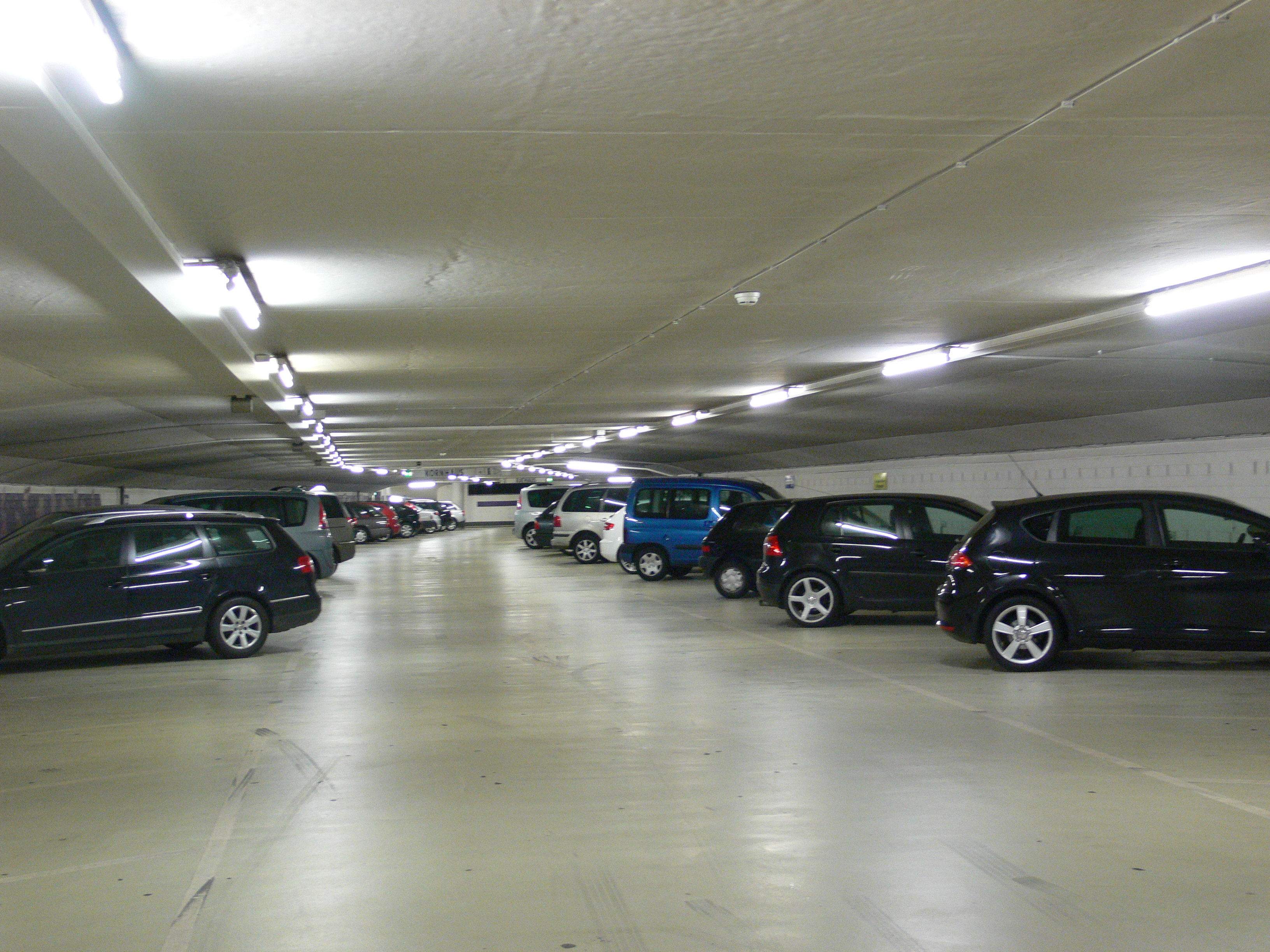 Ravensburg, Tiefgarage am Marienplatz